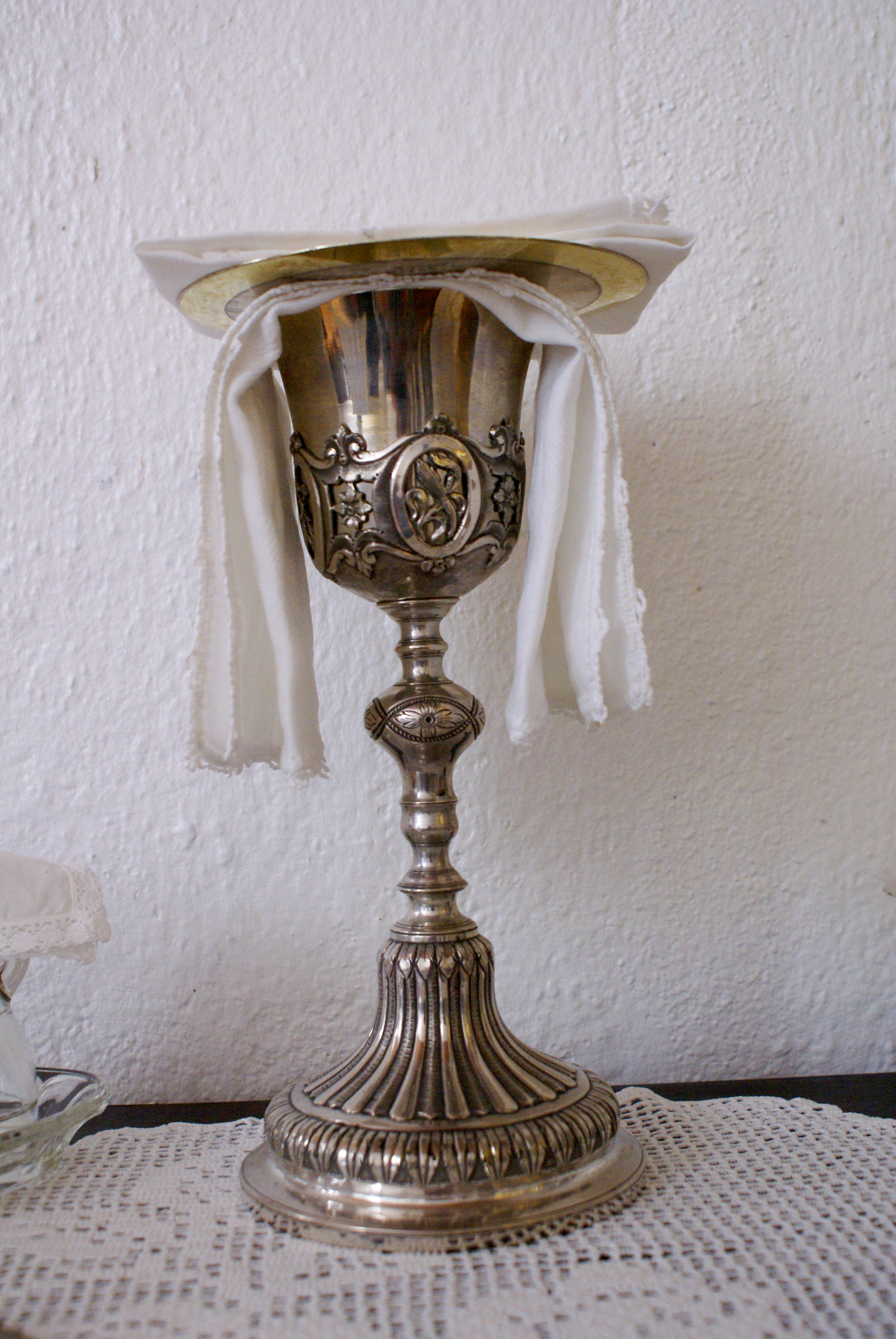 Ermida de São José, cálice em prata, Toledo, Velas, ilha de São Jorge, Açores